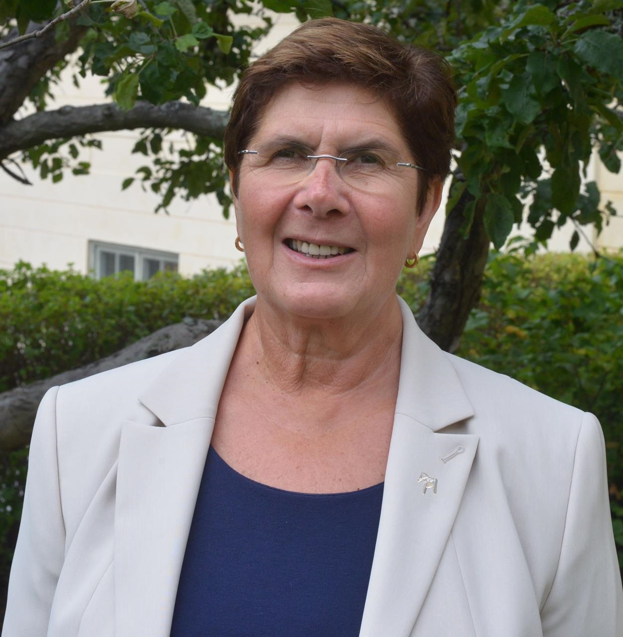 Ylva Thörn, f.d. ordförande i Svenska kommunalarbetareförbundet (1996-2010) och sen september 2015 landshövding i Dalarnas län.